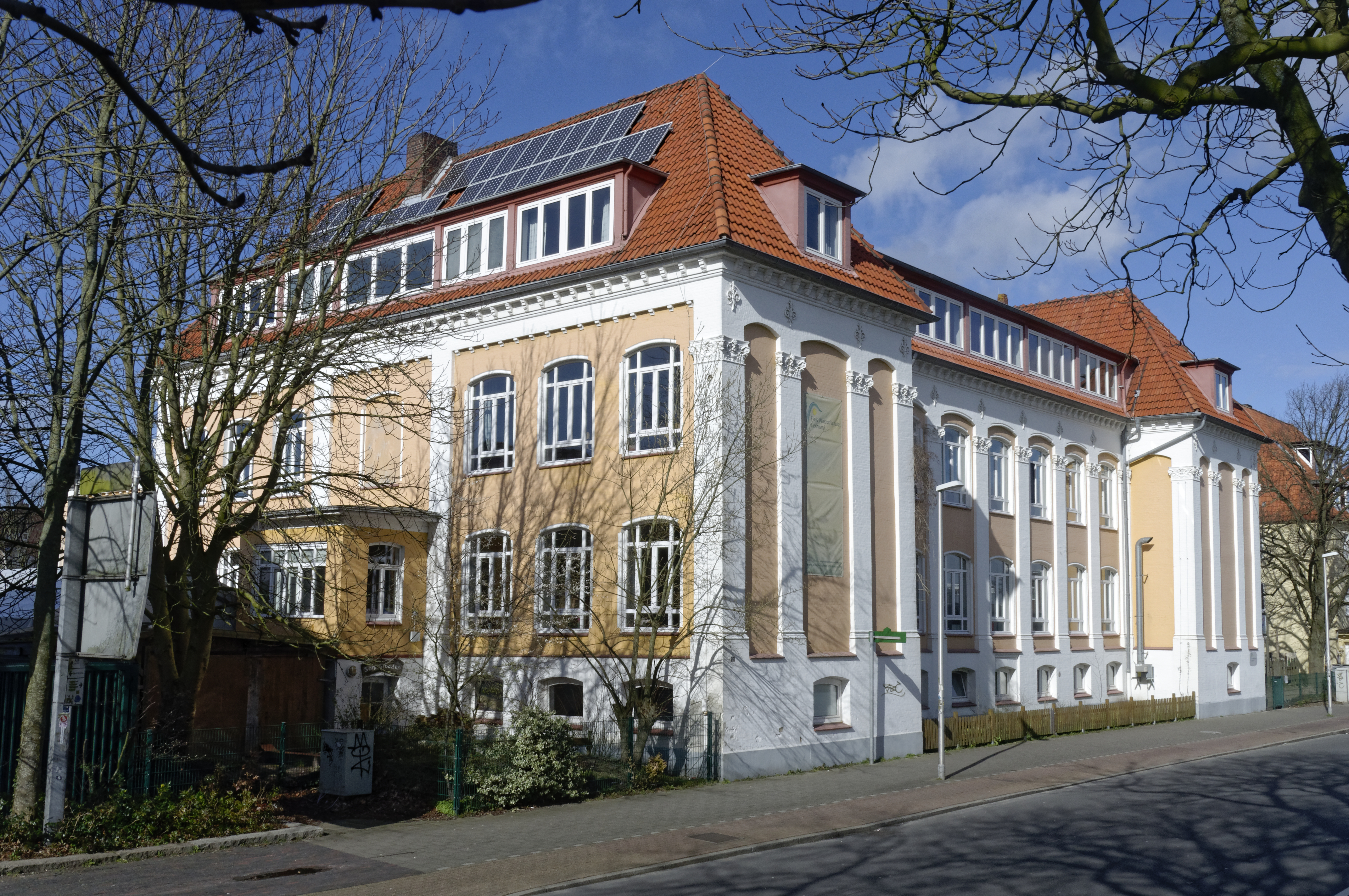 Cuxhaven 2020 -Deichstraße